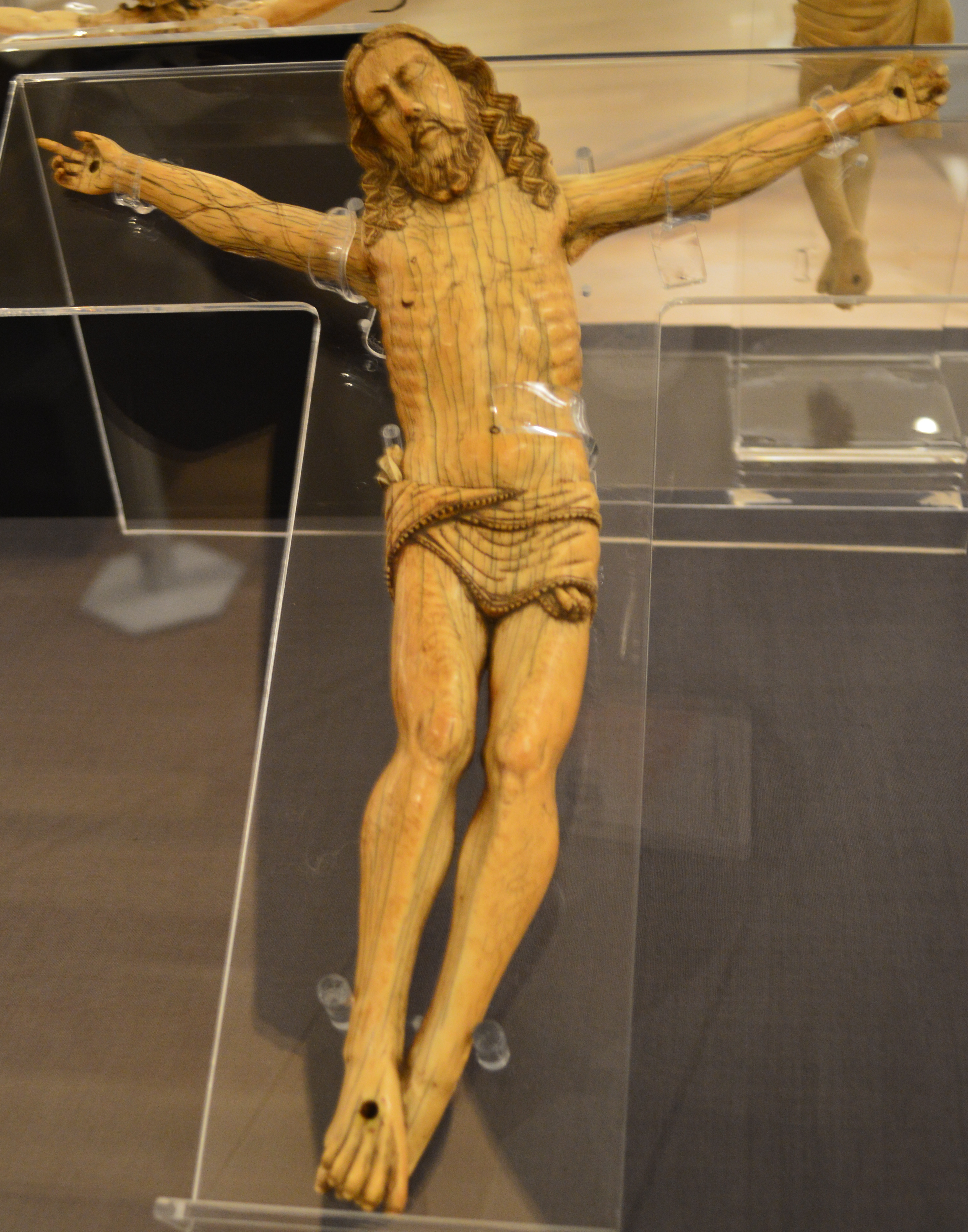 Cristo Hispanofilipino